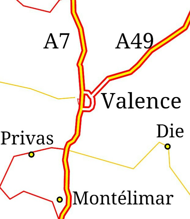 Réseaux d'autoroutes autour de Valence (France)